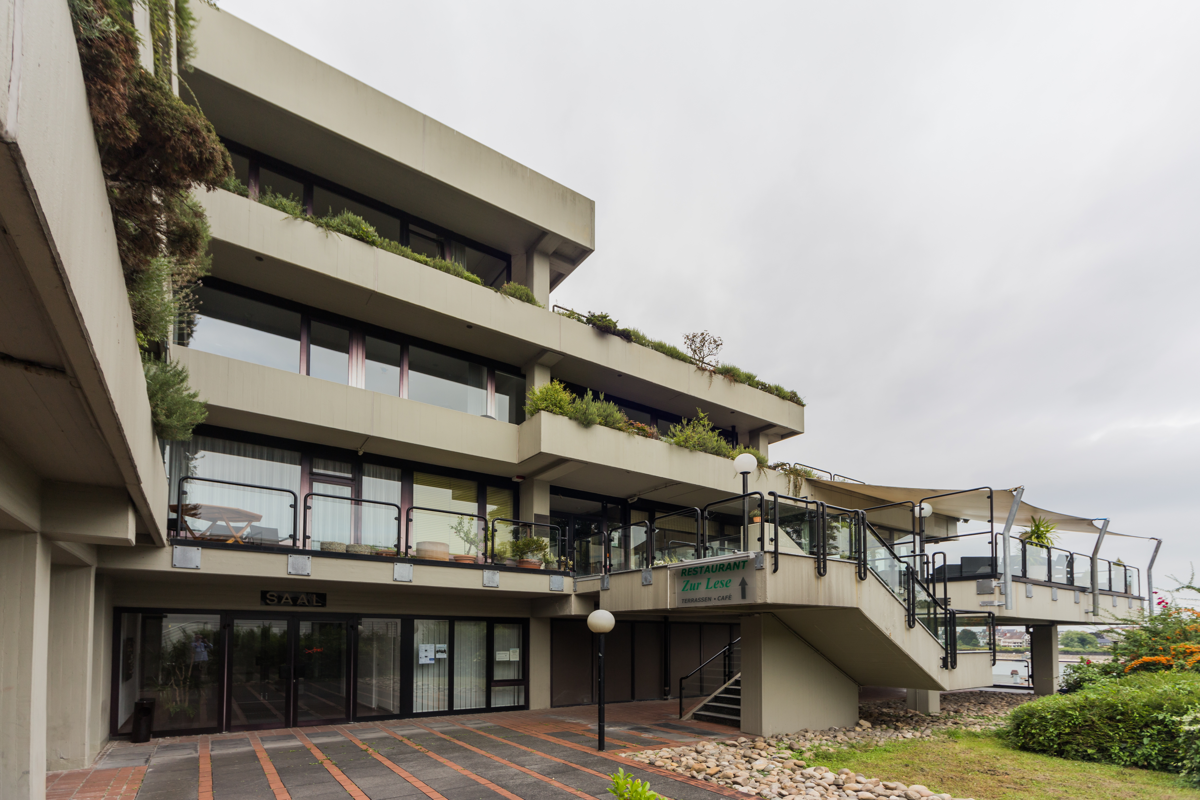 Haus der Evangelischen Kirche, Adenauerallee 37, Bonn-Südstadt: Blickrichtung Nordost